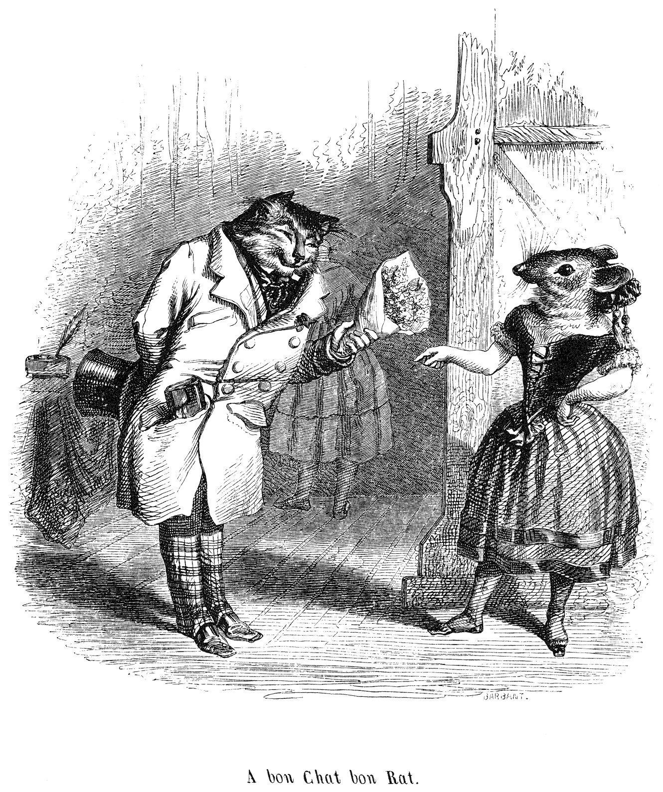 Grandville : Cent Proverbes